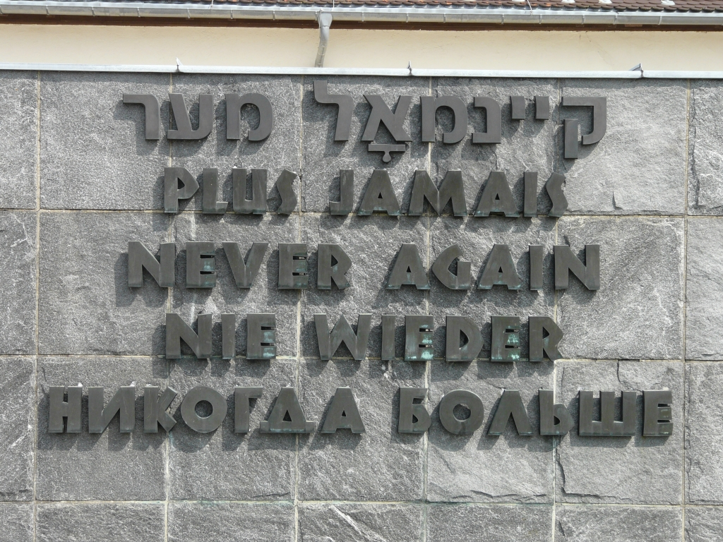 Inschrift "Nie wieder" (in den Sprachen Yiddish, Französisch, Englisch, Deutsch und Russisch) als Teil des Internationalen Mahnmals